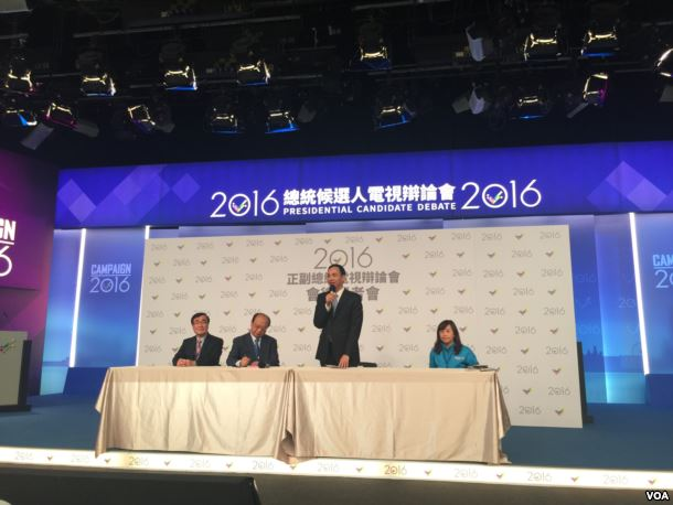 中文（台灣）: 2016年1月2日，2016年中華民國總統選舉各黨總統候選人進行第二場也是最後一場電視辯論會，就薪資等民眾關心議題發表政見。